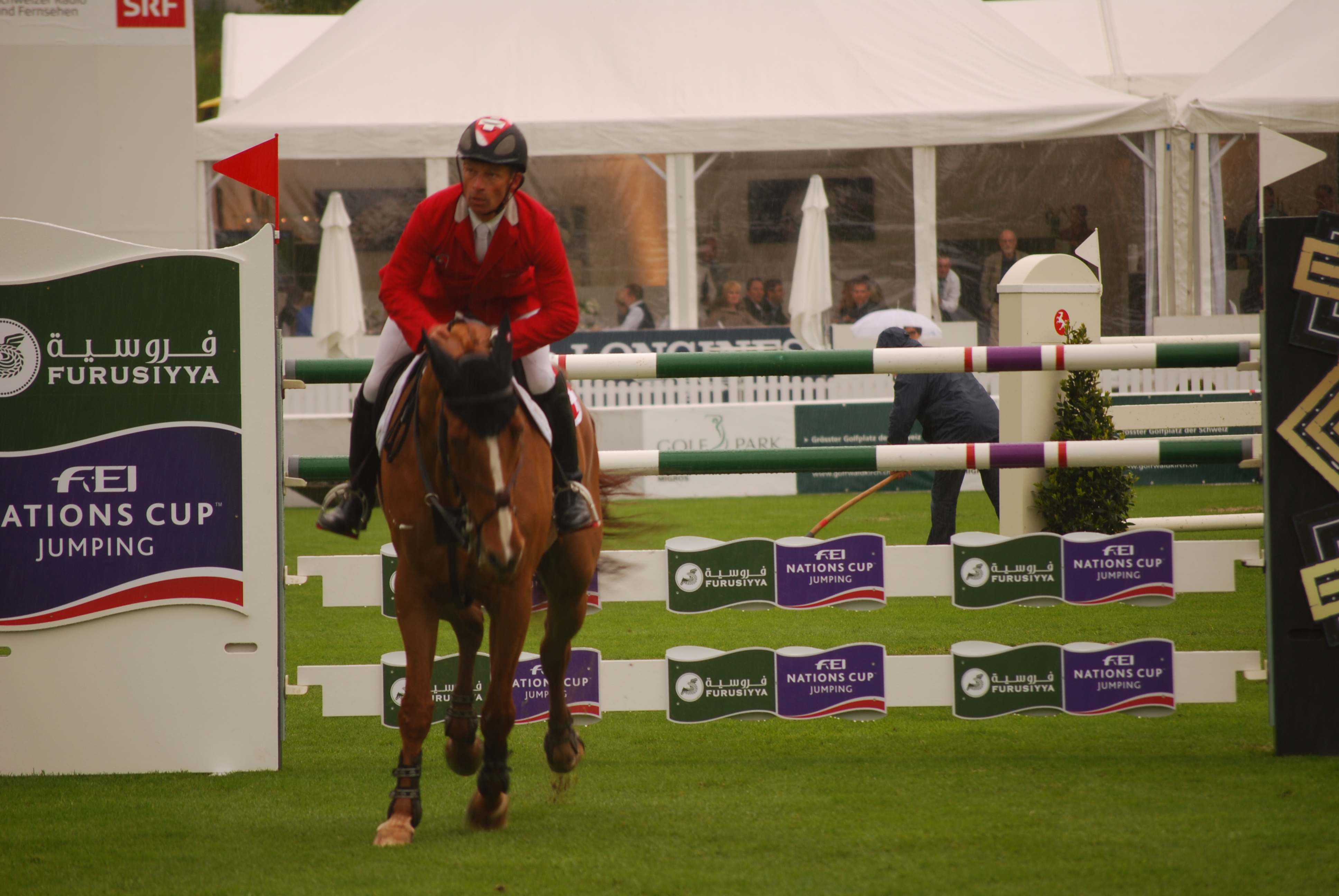 Pius Schwizer beendet seinen ersten Umgang im Nationenpreis von St. Gallen ohne Fehler